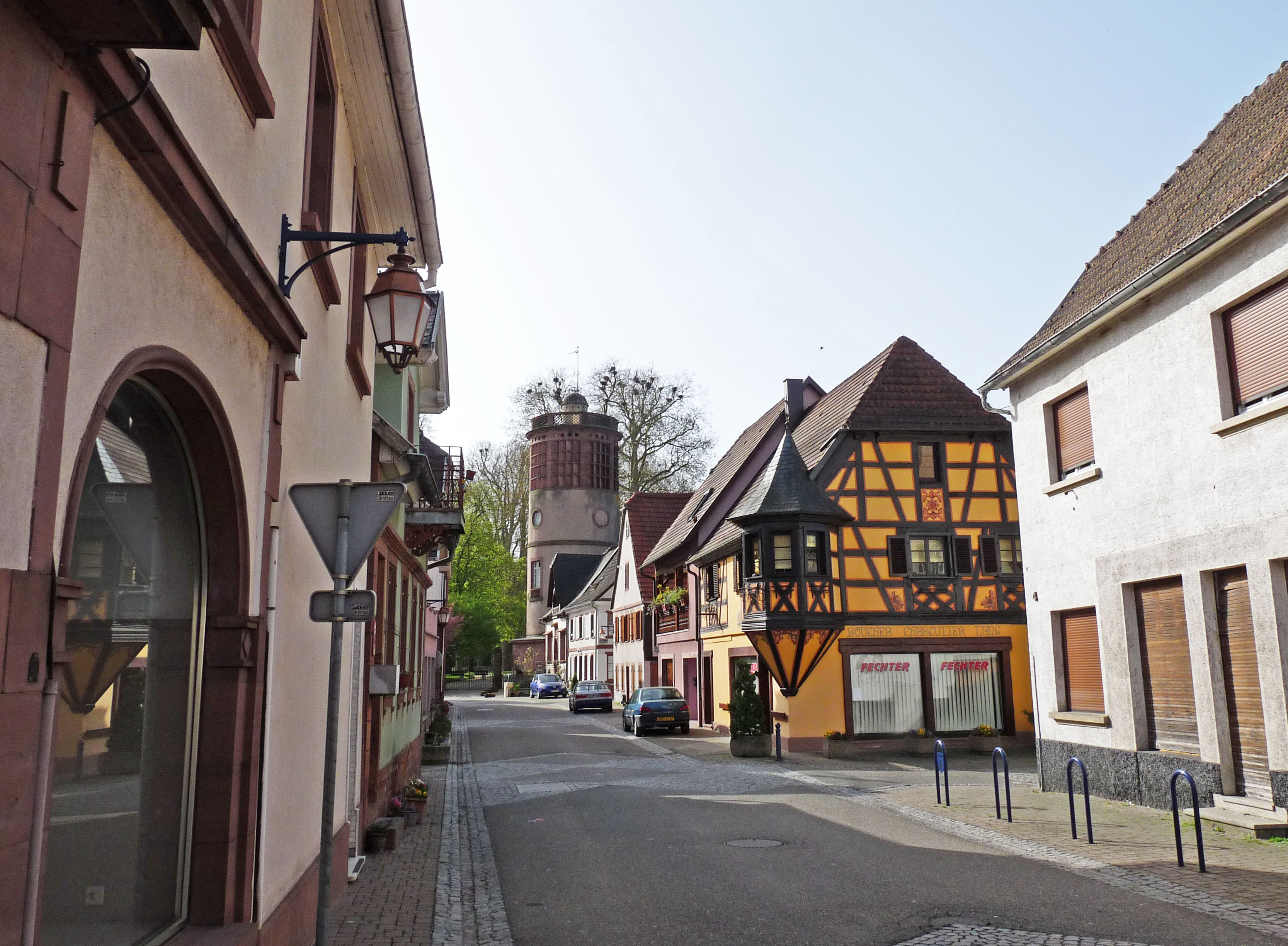 Château De Dietrich à Reichshoffen (Bas-Rhin). Classé Monument historique en 1940.